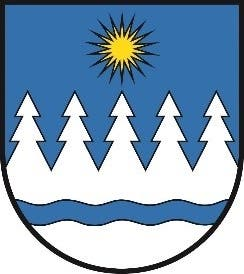 Vorschlag für ein Wappen der Einheitsgemeinde Neckertal, die 2023 aus den bisherigen Gemeinden Neckertal, Hemberg und Oberhelfenschwil entstehen soll.